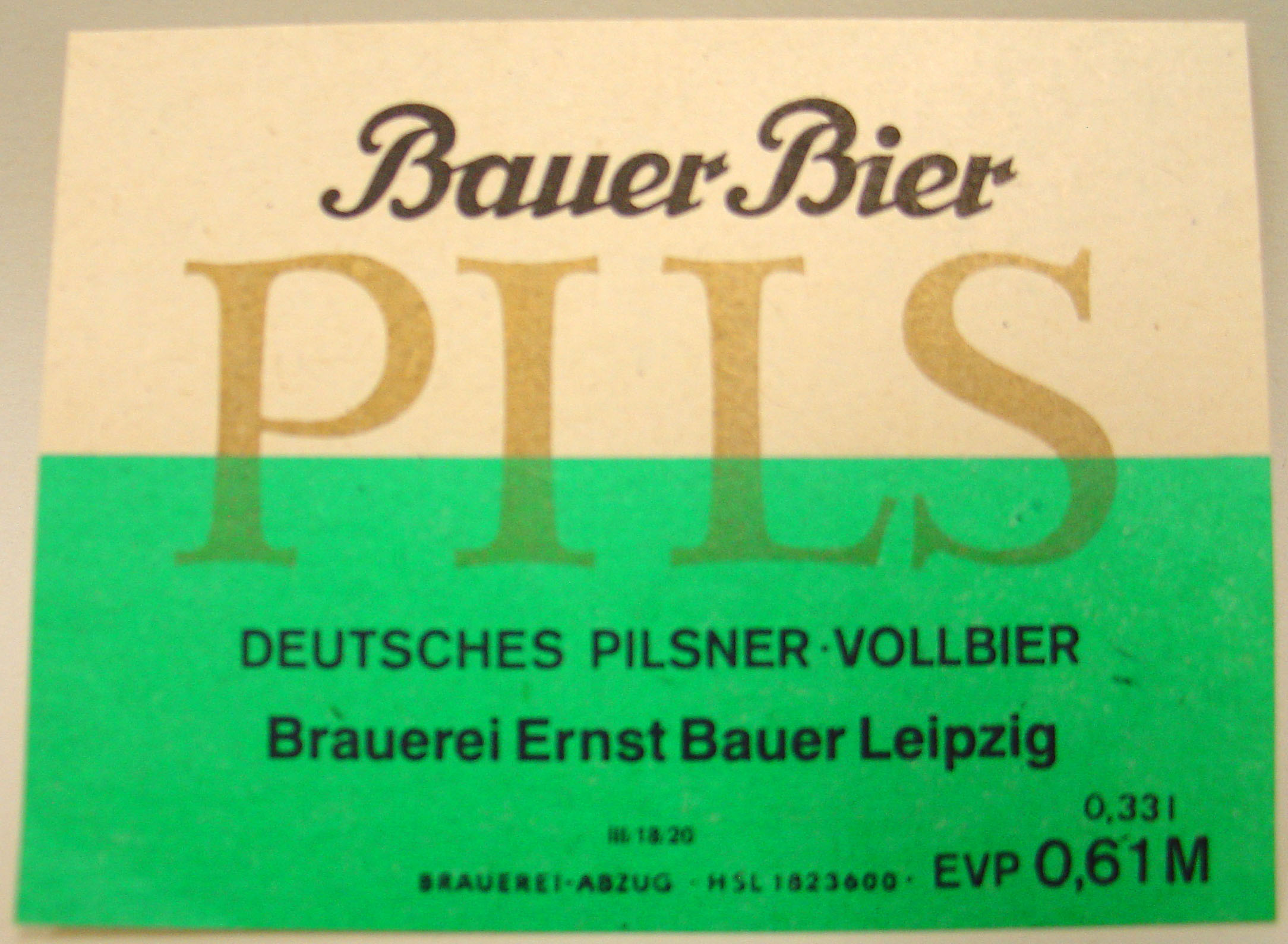 Bauer Bier Pils Etikett Brauerei Ernst Brauer Leipzig (DDR)